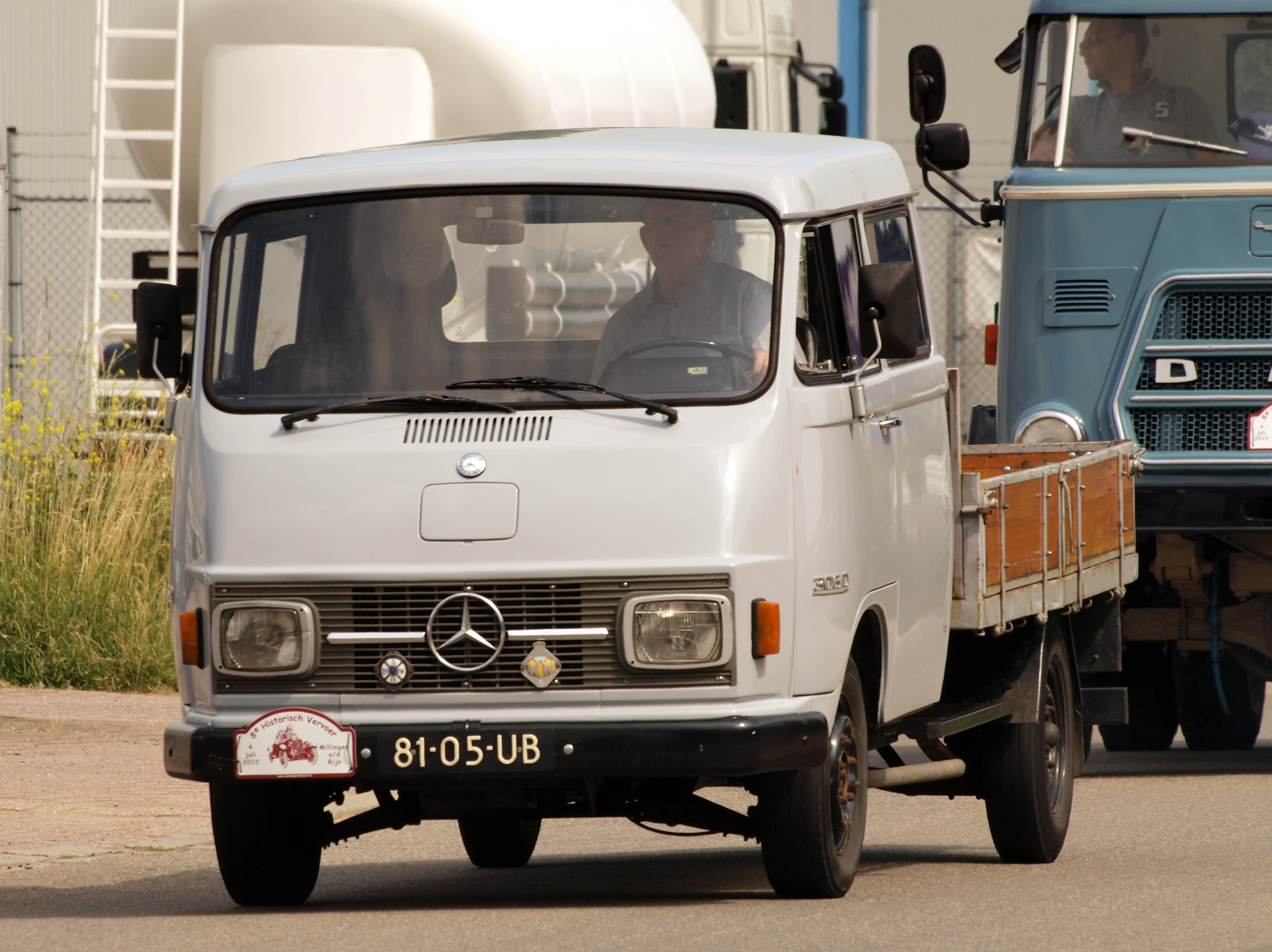 Mercedes Benz L306 D (1977)